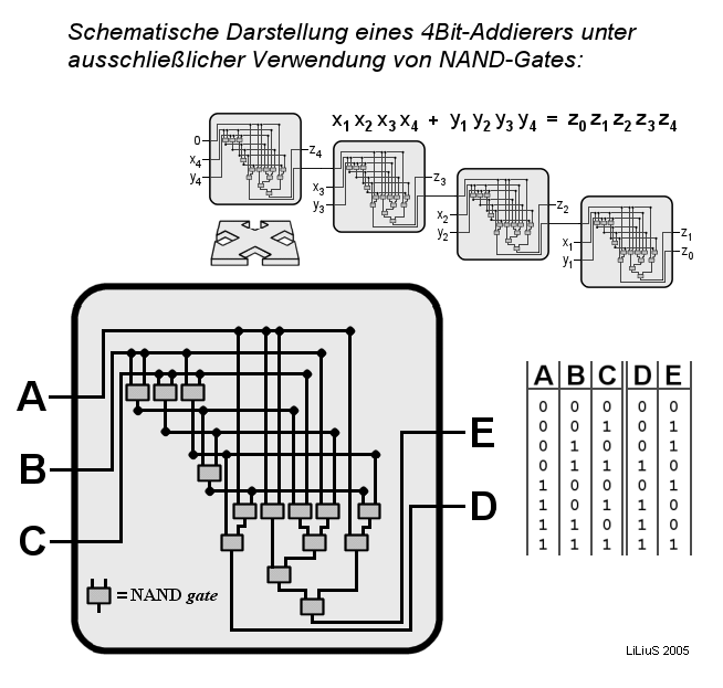 Schematische Darstellung eines 4Bit-Addierers unter ausschließlicher Verwendung von NAND-Gates